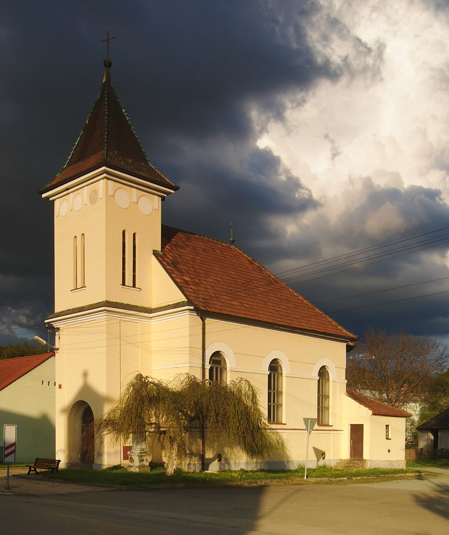 Kostel Panny Marie pomocnice křesťanů, Skalice nad Svitavou, okres Blansko